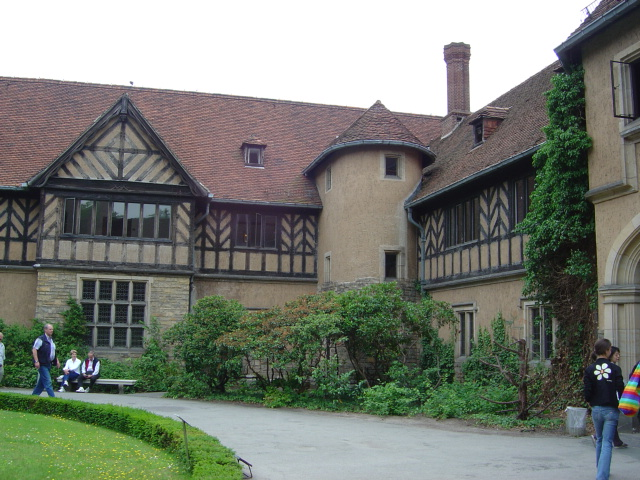 Museo de la conferencia de Potsdam